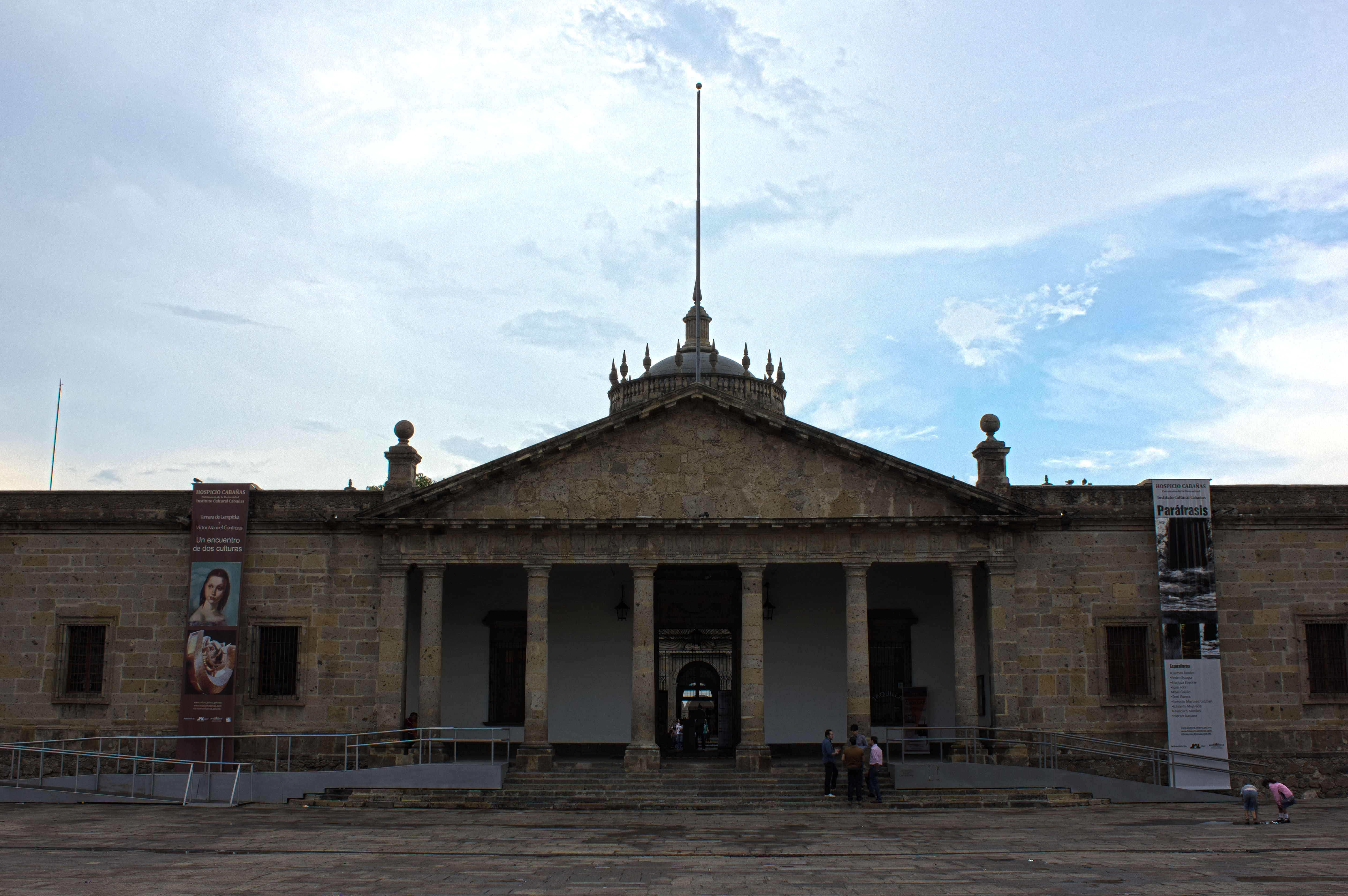 Frente del Hospicio Cabañas